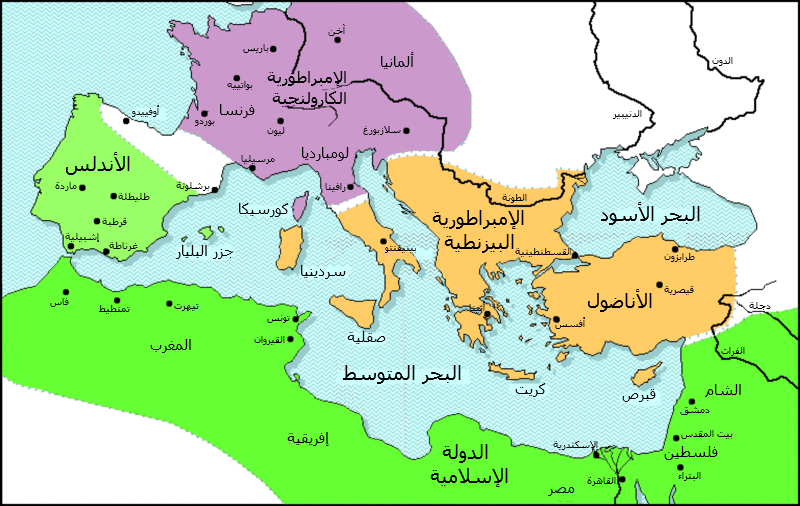 تقسيم حوض البحر الأبيض المتوسط في أوائل العصور الوسطى (عام 800 للميلاد)